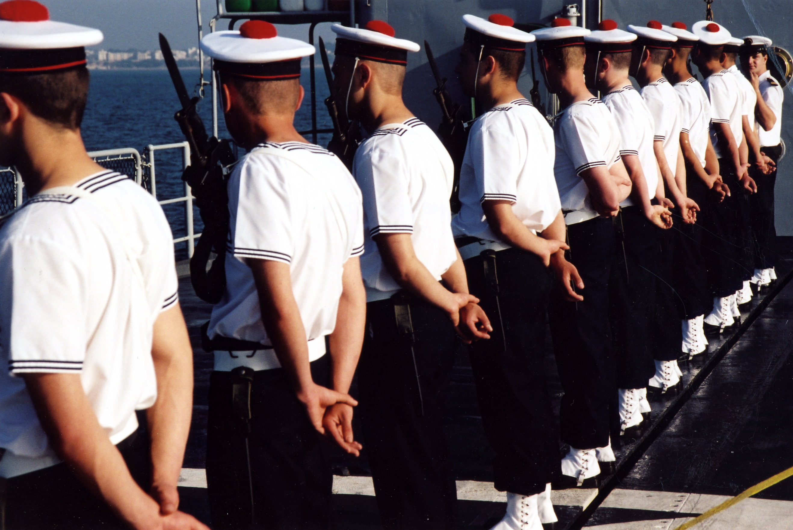 Garde d'honneur sur la frégate Tourville